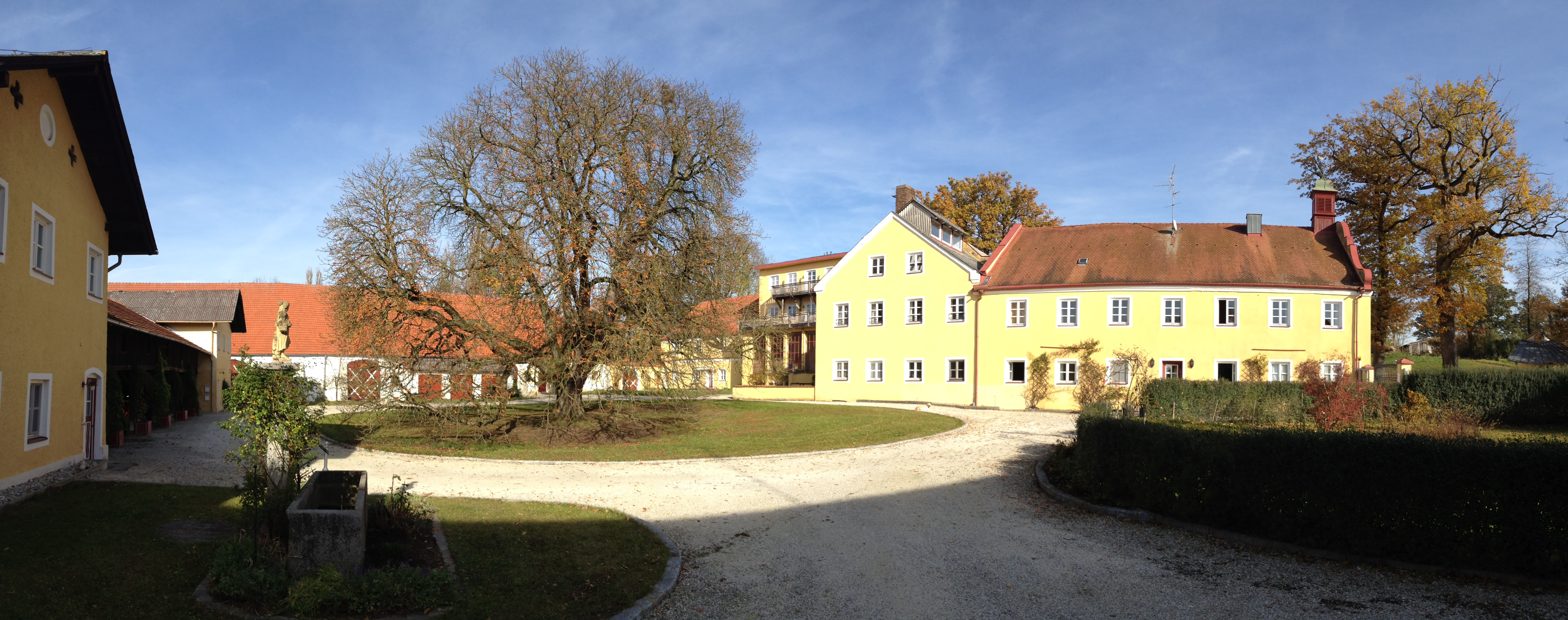 Schloss Pillham, Ruhstorf an der Rott